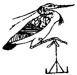 Bennu.jpg